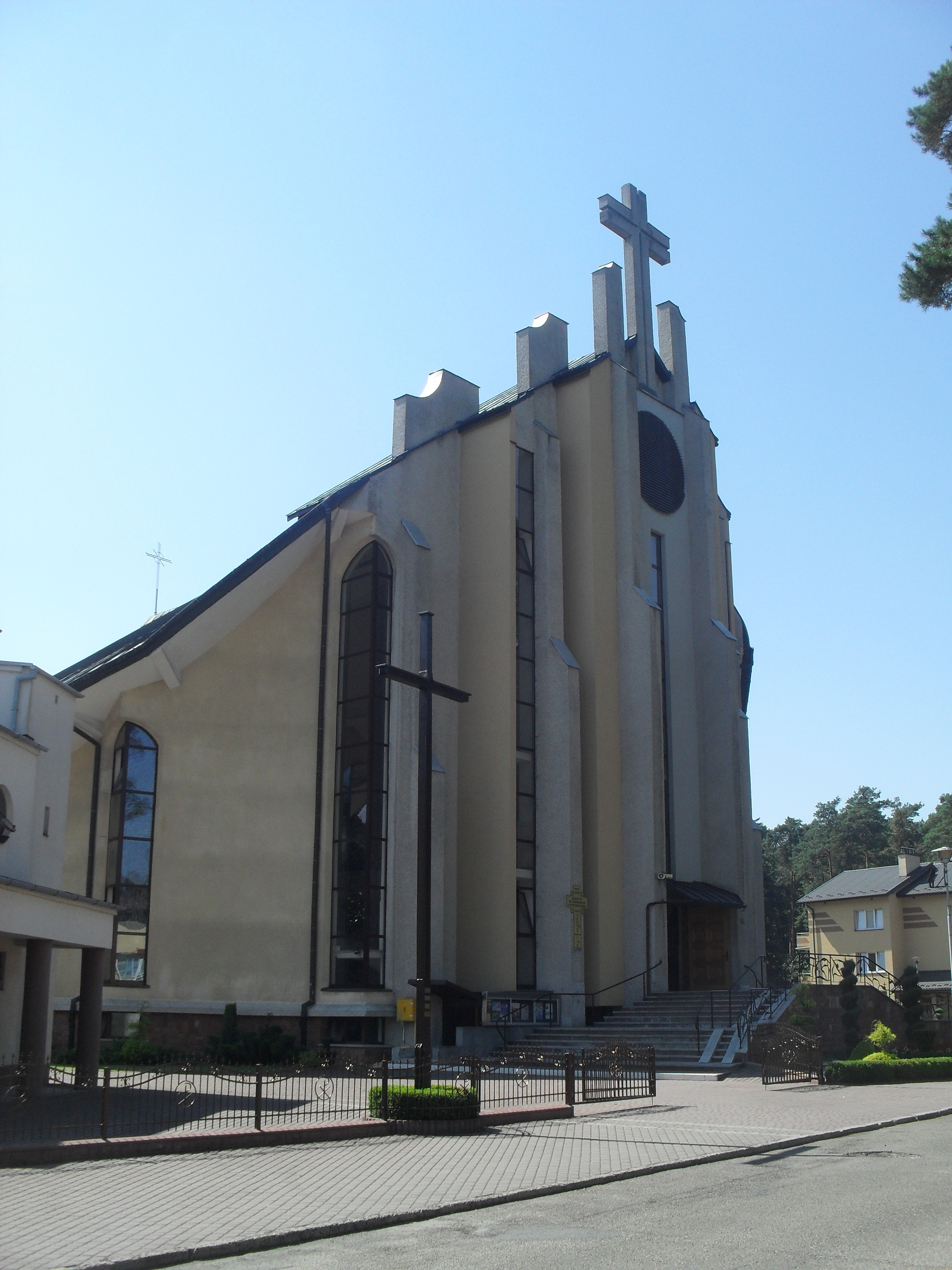 Kościół w Pustkowie-Osiedlu pw. św. Stanisłąwa Biskupa